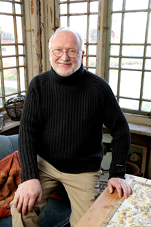 Seppo Tamminen.1